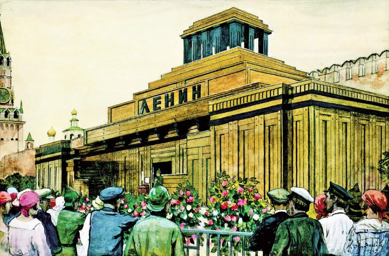 И. И. Бродский У Мавзолея В. И. Ленина 1924 Бумага, акварель, графитный карандаш, гуашь, белила 26,6 x 39,9